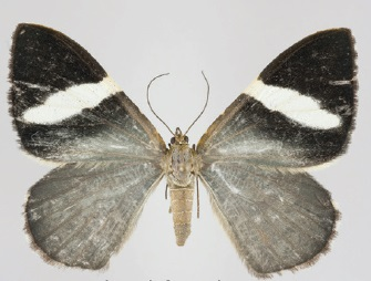 Hagnagora richardi